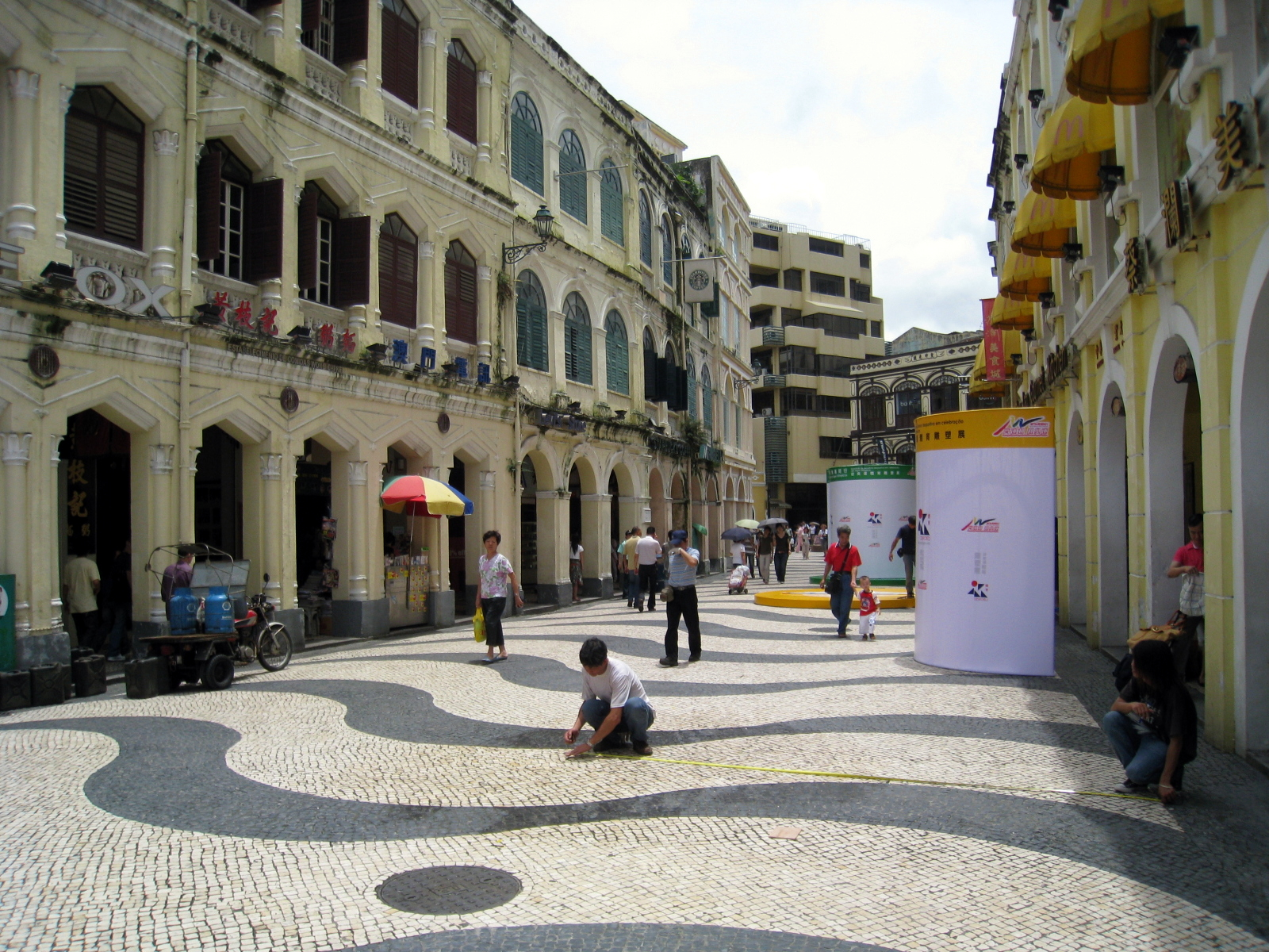 Largo do Senado Exhibition 議事亭前地